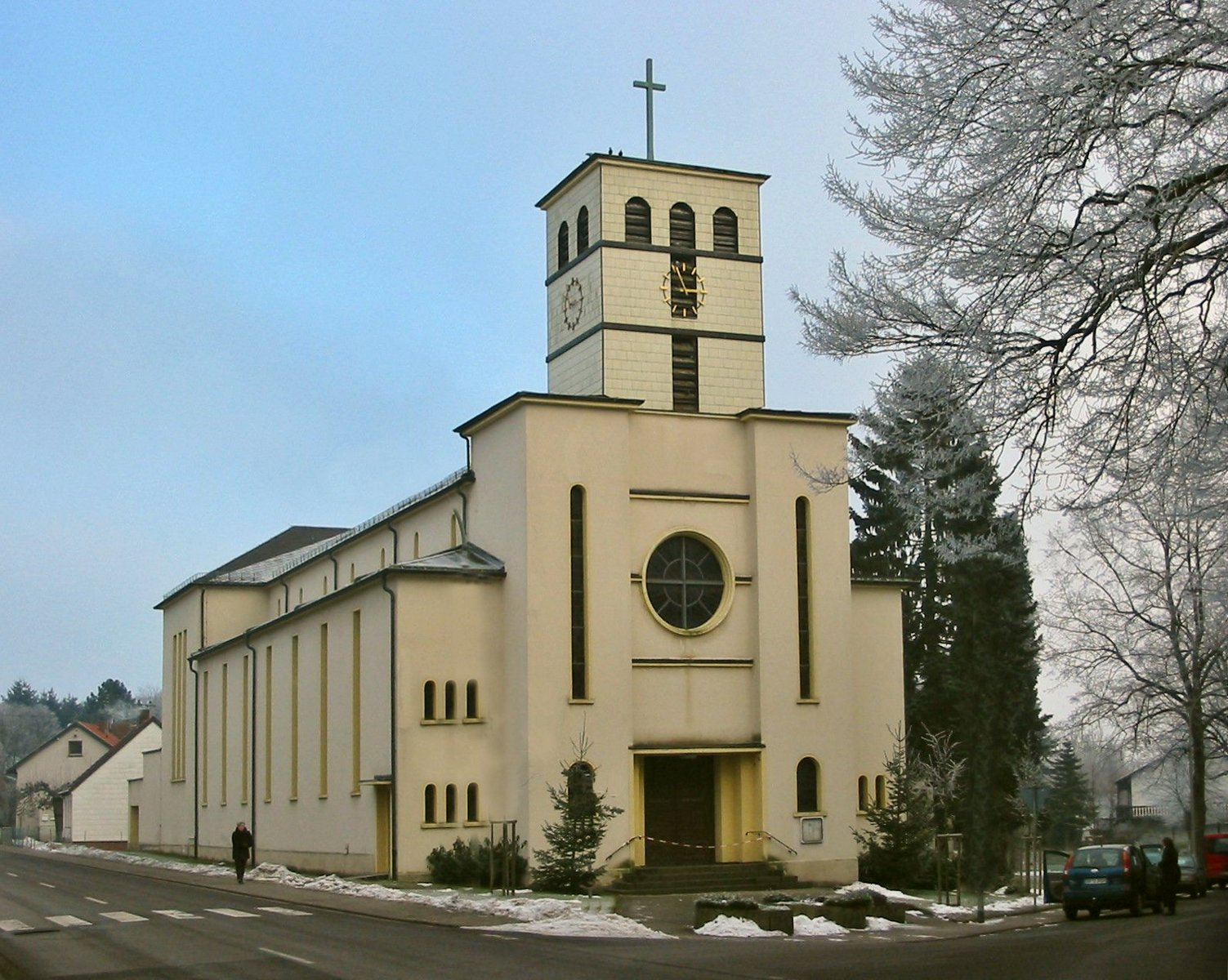 Bildbeschreibung: ... Quelle: selbst fotografiert Fotograf: Lokilech Datum: siehe Metadaten